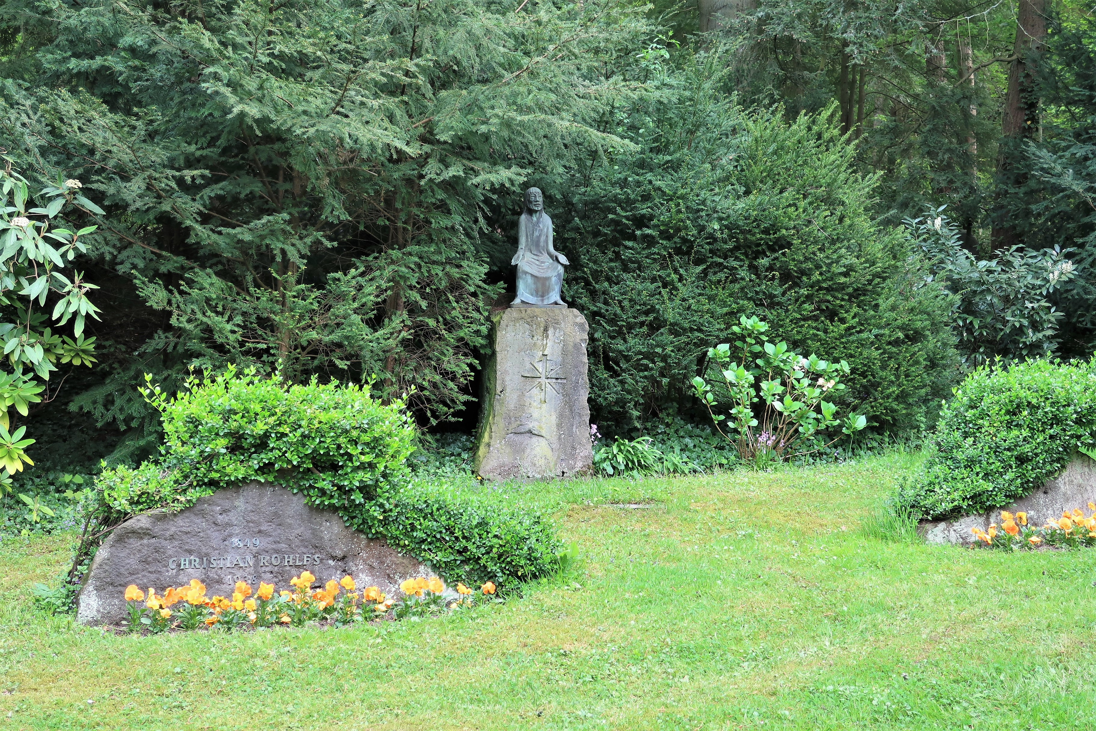 Ehrengrab des Malers Christian Rohlfs (1849–1938) auf dem Friedhof Delstern in Hagen, Am Berghang. Sein Grabmal schmückt im Hintergrund ein Abguss der 1931 von Ernst Barlach geschaffenen Bronze-Plastik „Der lehrende Christus“.